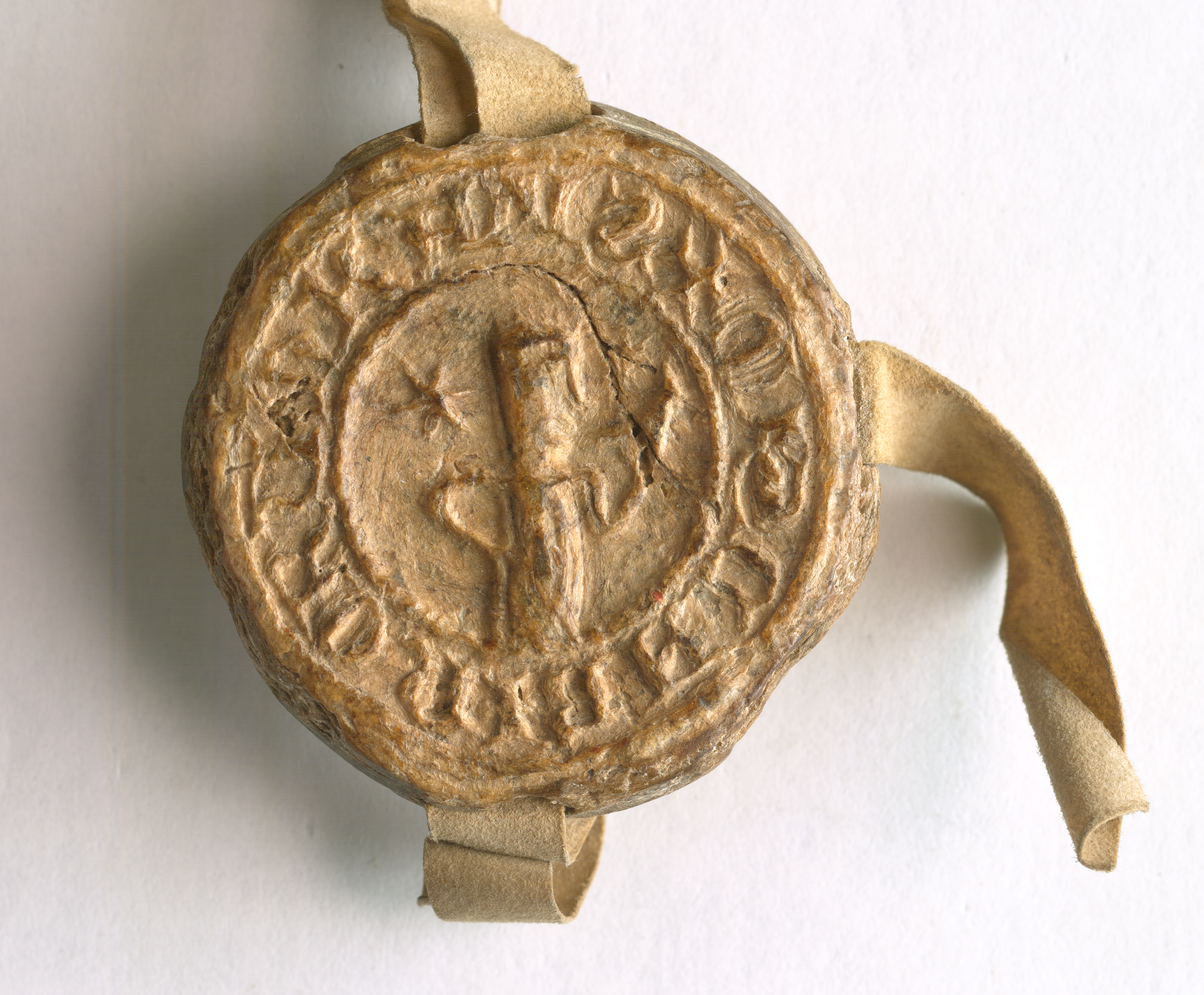 Pieczęć ławnicza miasta Kalisza, odcisk w naturalnym wosku zawieszony na pasku pergaminowym. Legenda: + S'SCABINORUM CALIS.